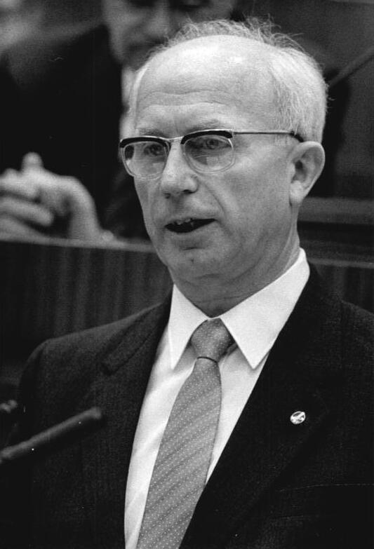 ADN-ZB/Mittelstädt 17.6.86-Berlin: Volkskammertagung Auf der 2. Tagung der Volkskammer sprach für die Fraktion der DBD der Abgeordnete Dr. Ernst Mecklenburg.